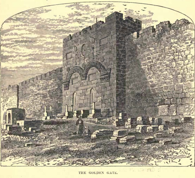 Jerusalem: The Golden Gate